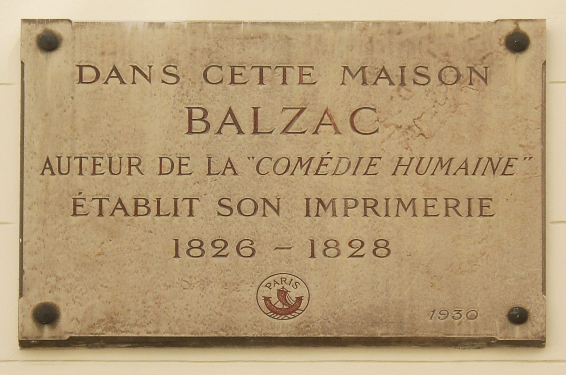 Plaque apposée au n° 17 de la rue Visconti, Paris 6e, où Honoré de Balzac (1799-1850) avait établi son imprimerie entre 1826 et 1828.